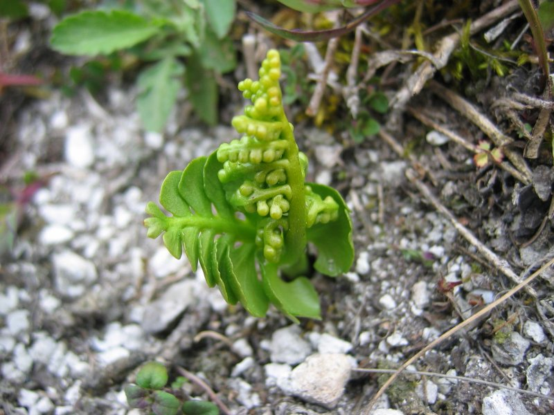 Mondraute Botrychium lunaria, Rügen